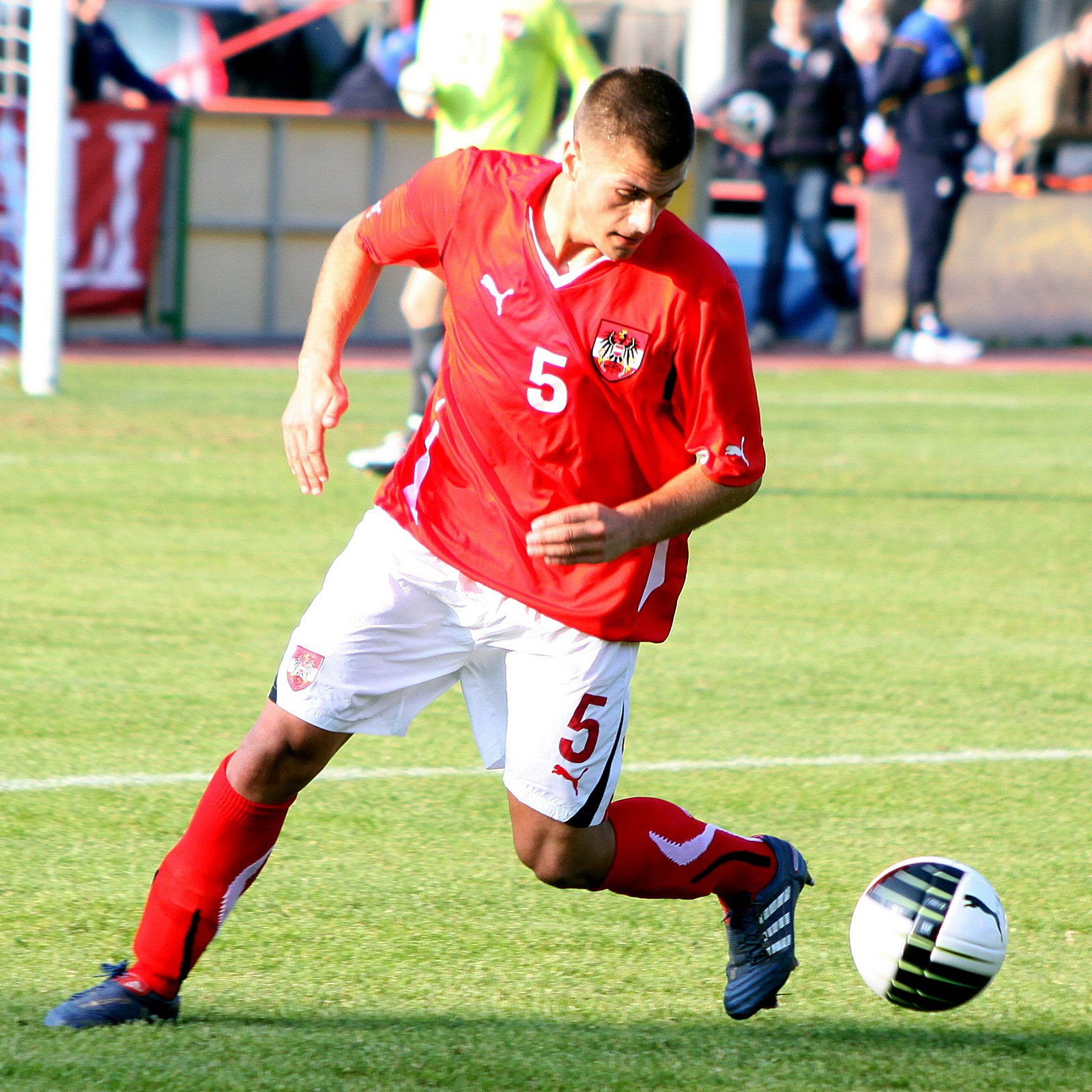 Michael Schimpelsberger (FC Twente Enschede) - Österreichische Fußballnationalmannschaft (U-21-Männer)